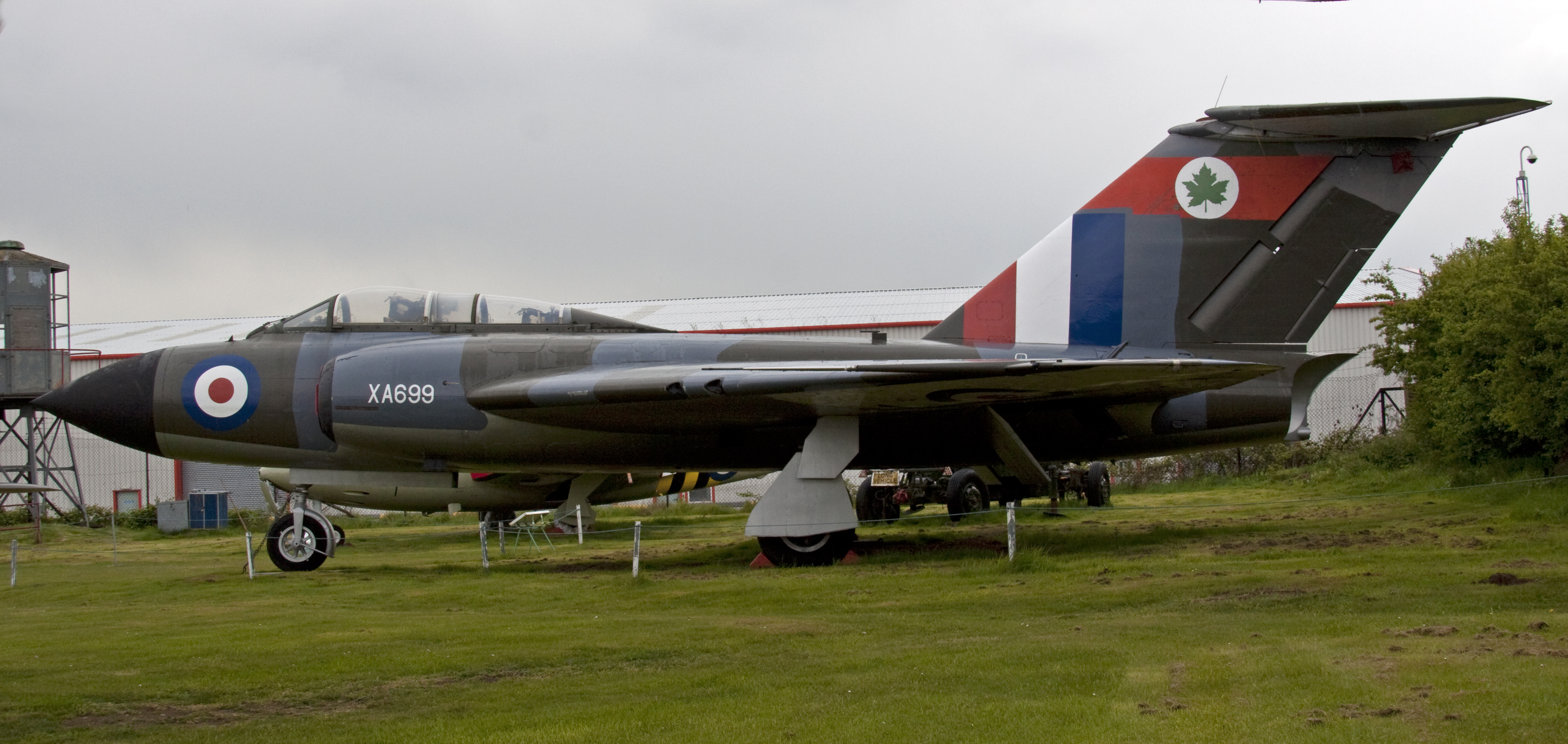 Gloster Javelin FAW5